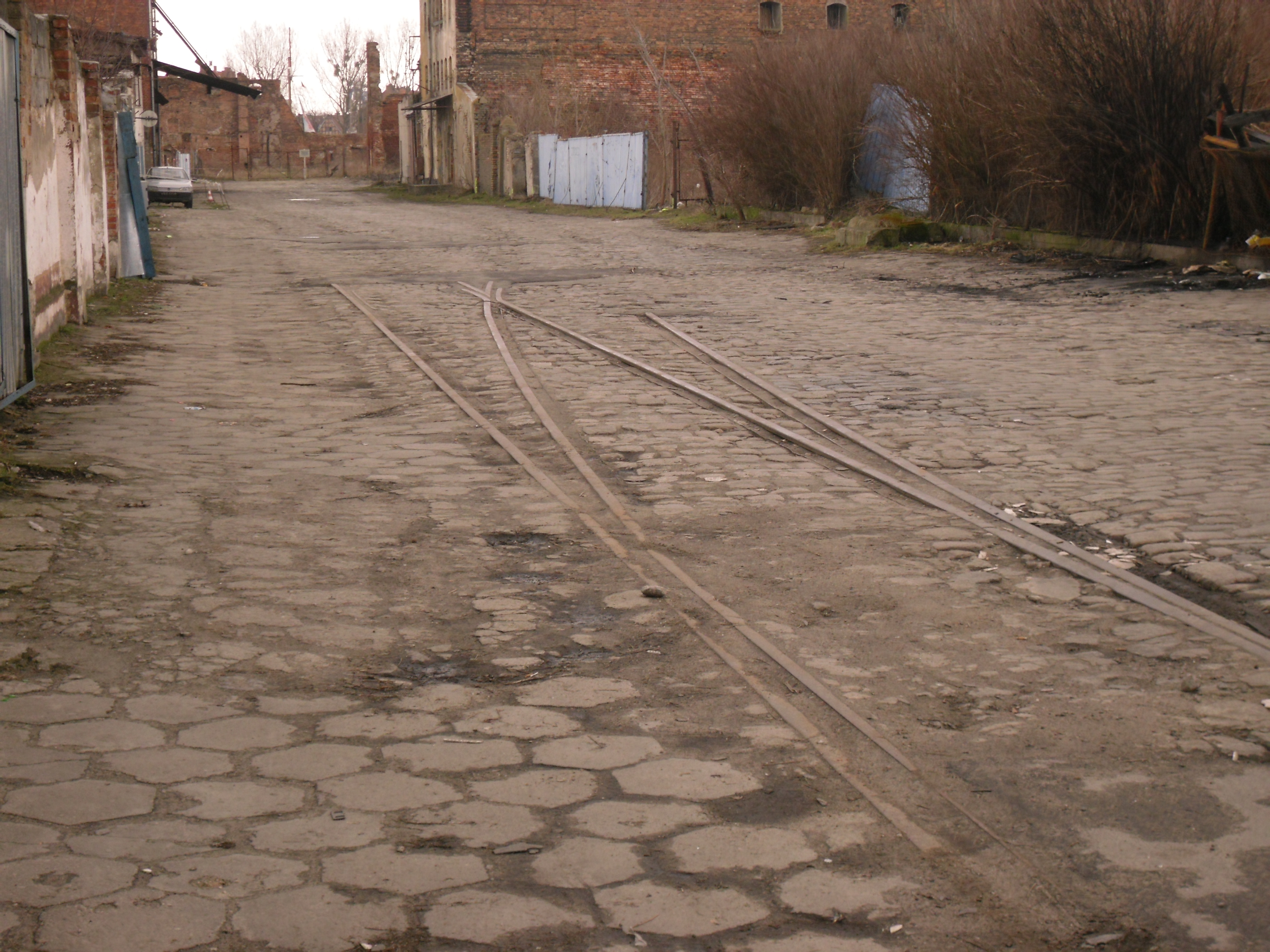 Od wielu lat nieużywane torowisko na Wyspie Spichrzów w Gdańsku, wzdłuż ul. Chmielnej.